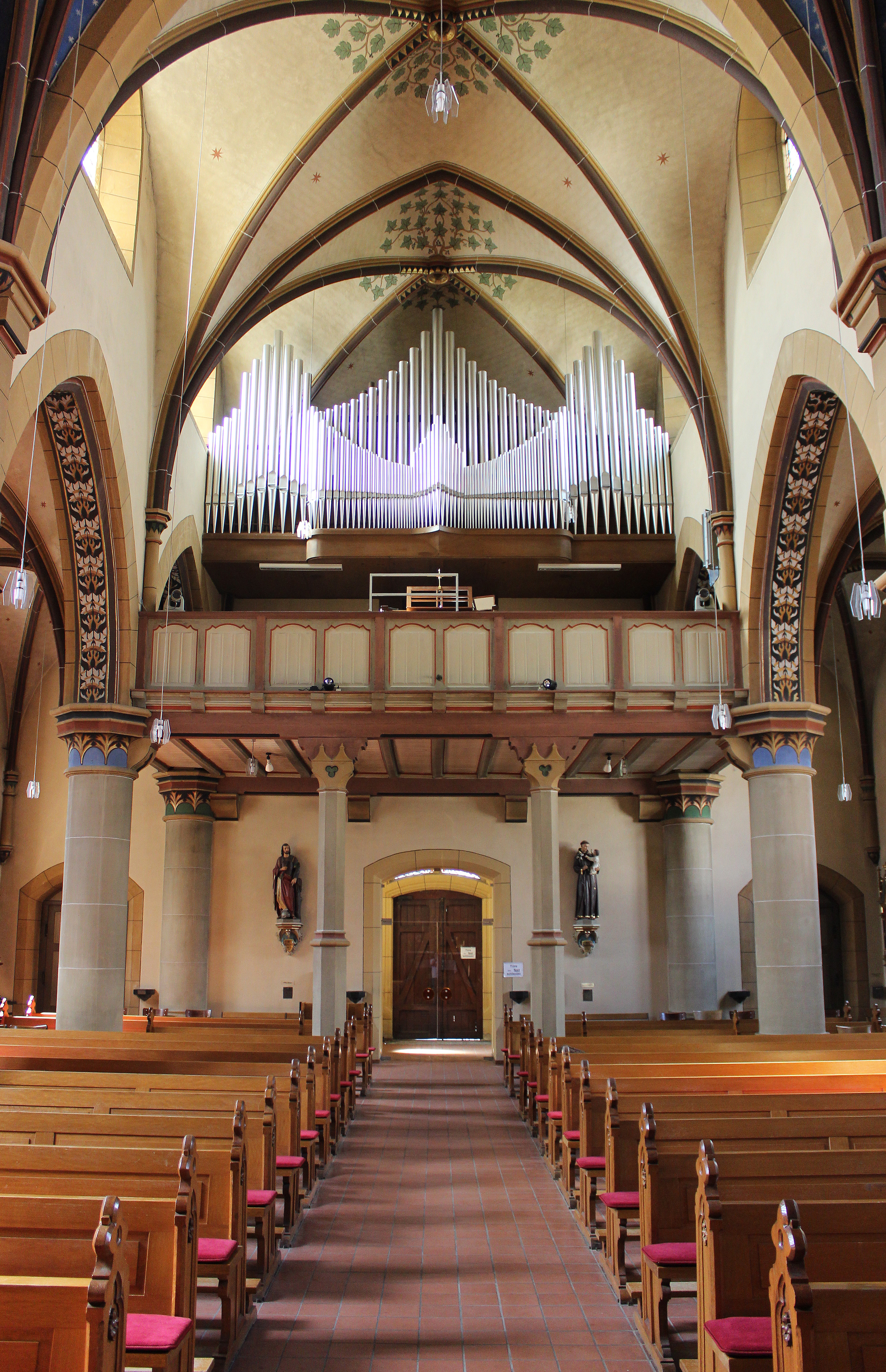 Blick ins Innere der katholischen Pfarrkirche Heilige Familie in Winterbach, einem Stadtteil von St. Wendel, Landkreis St. Wendel, Saarland